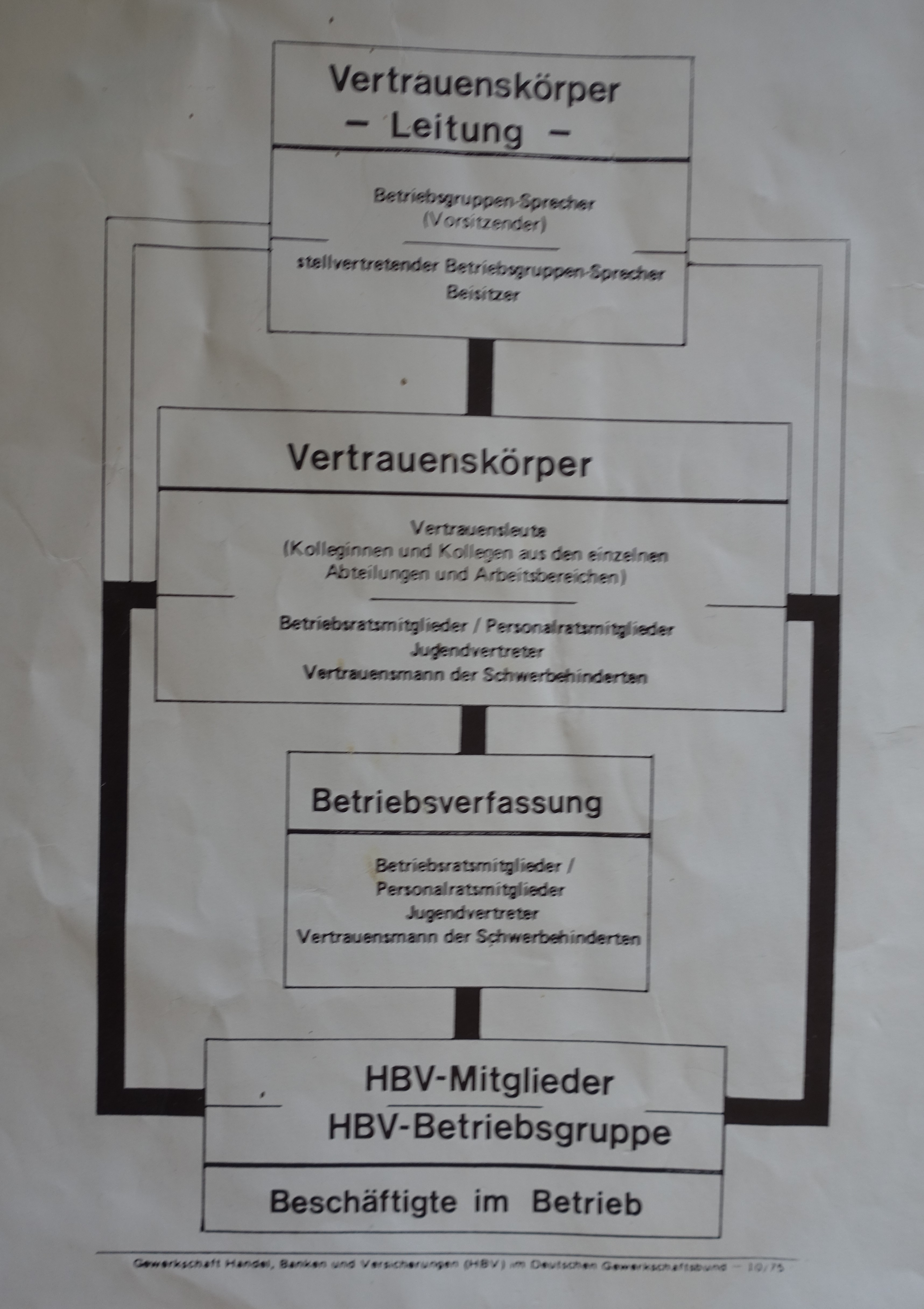 Aufbau der Gewerkschaft HBV im Betrieb